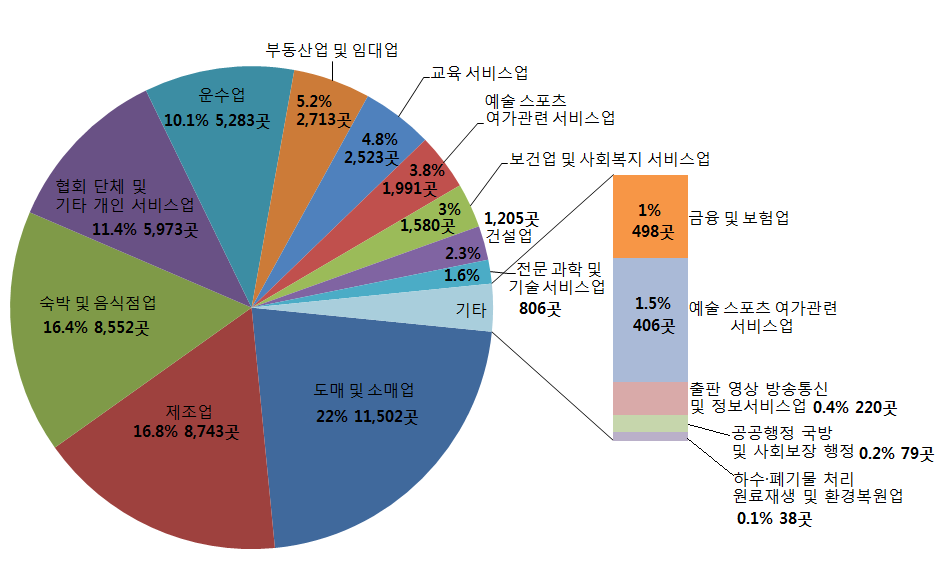 부천시 업체별 산업구조